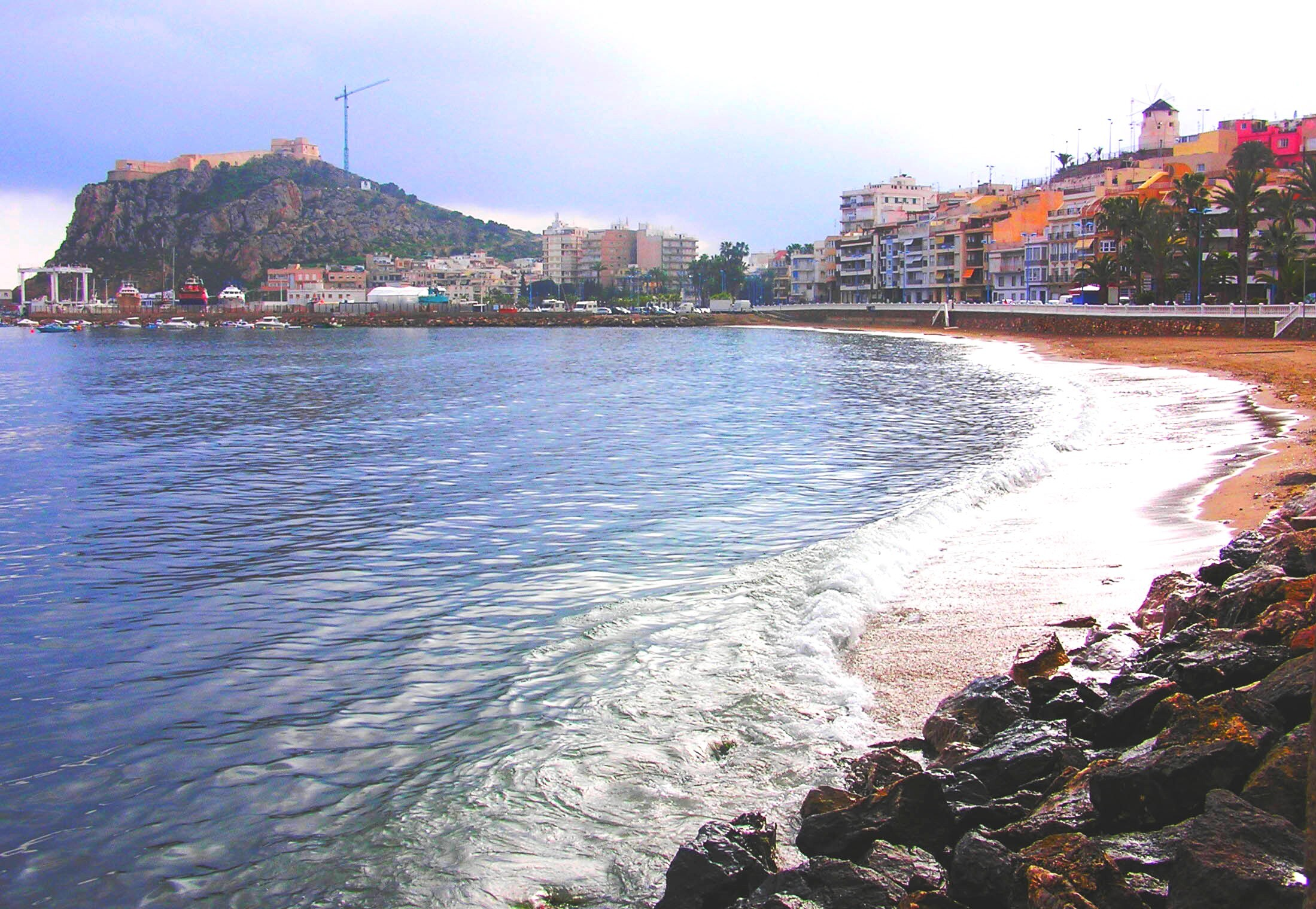 Vista de Águilas (Murcia), con el puerto pesquero y el castillo.